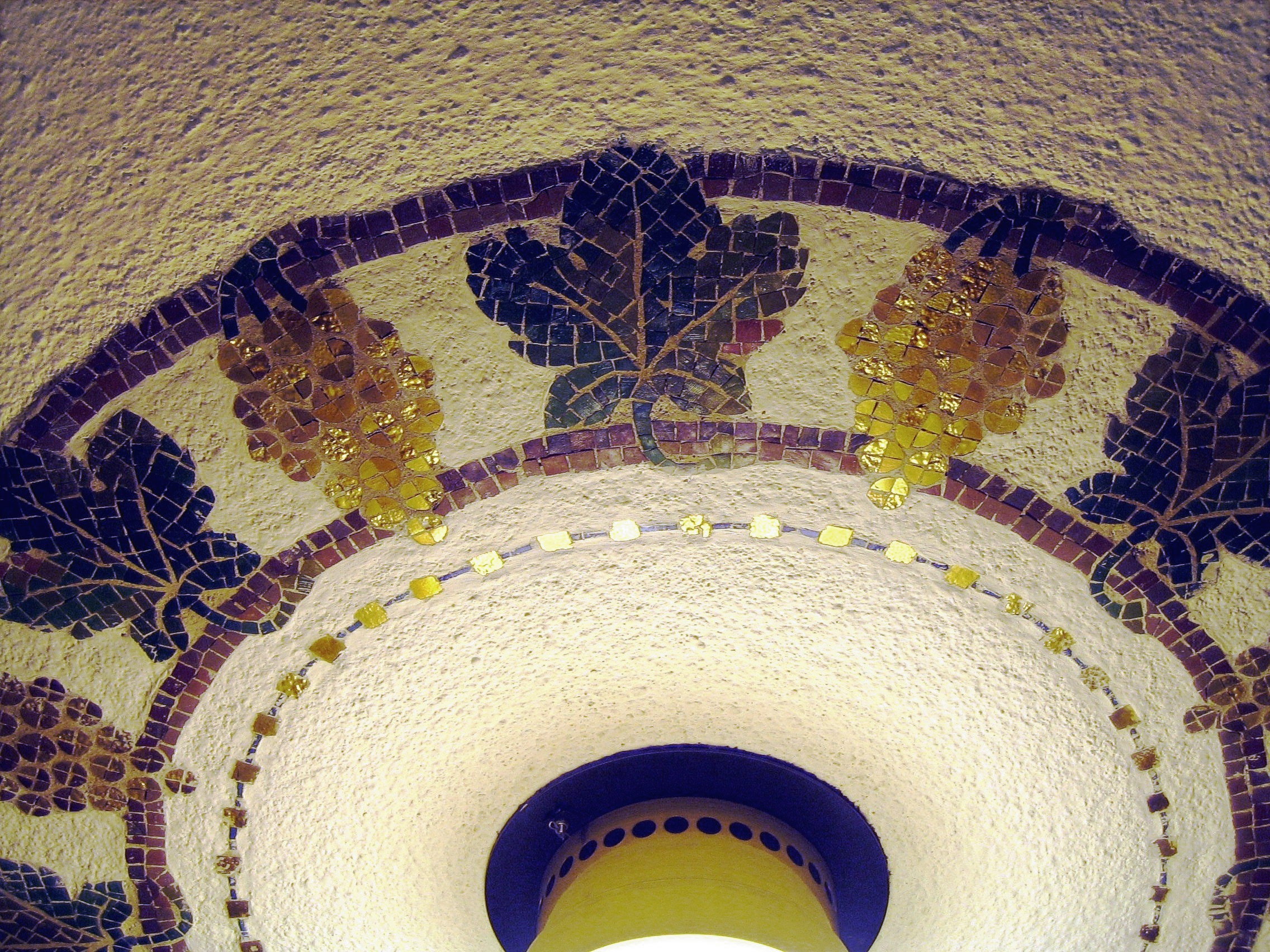 Berlin, U-Bahnhof Rüdesheimer Platz, Einfassung der Deckenlampen, Mosaik.